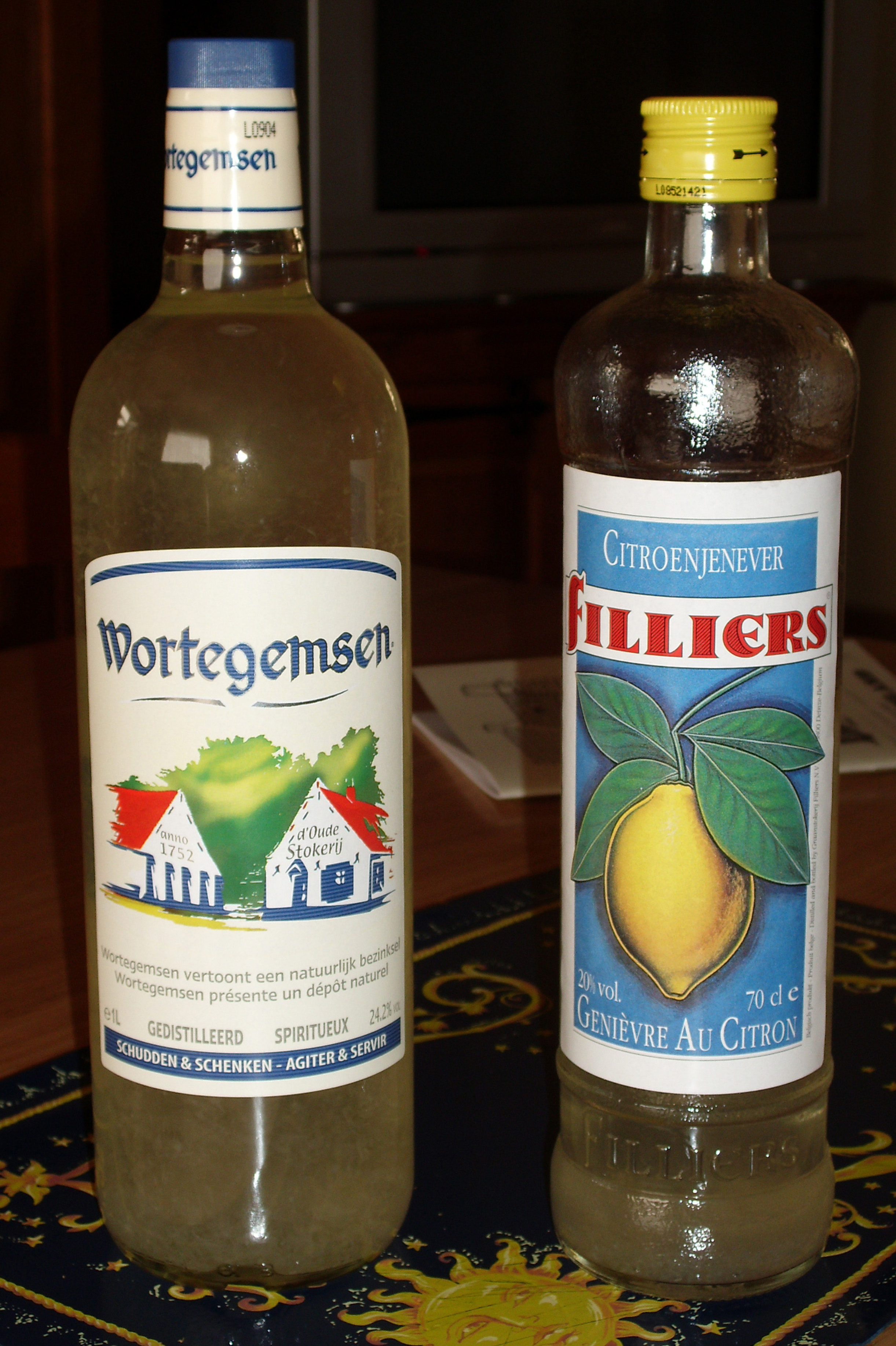 Wortegemsen (uit Waregem) in 2009 overgenomen door Filliers uit Deinze - Oost-Vlaanderen - Vlaanderen - België